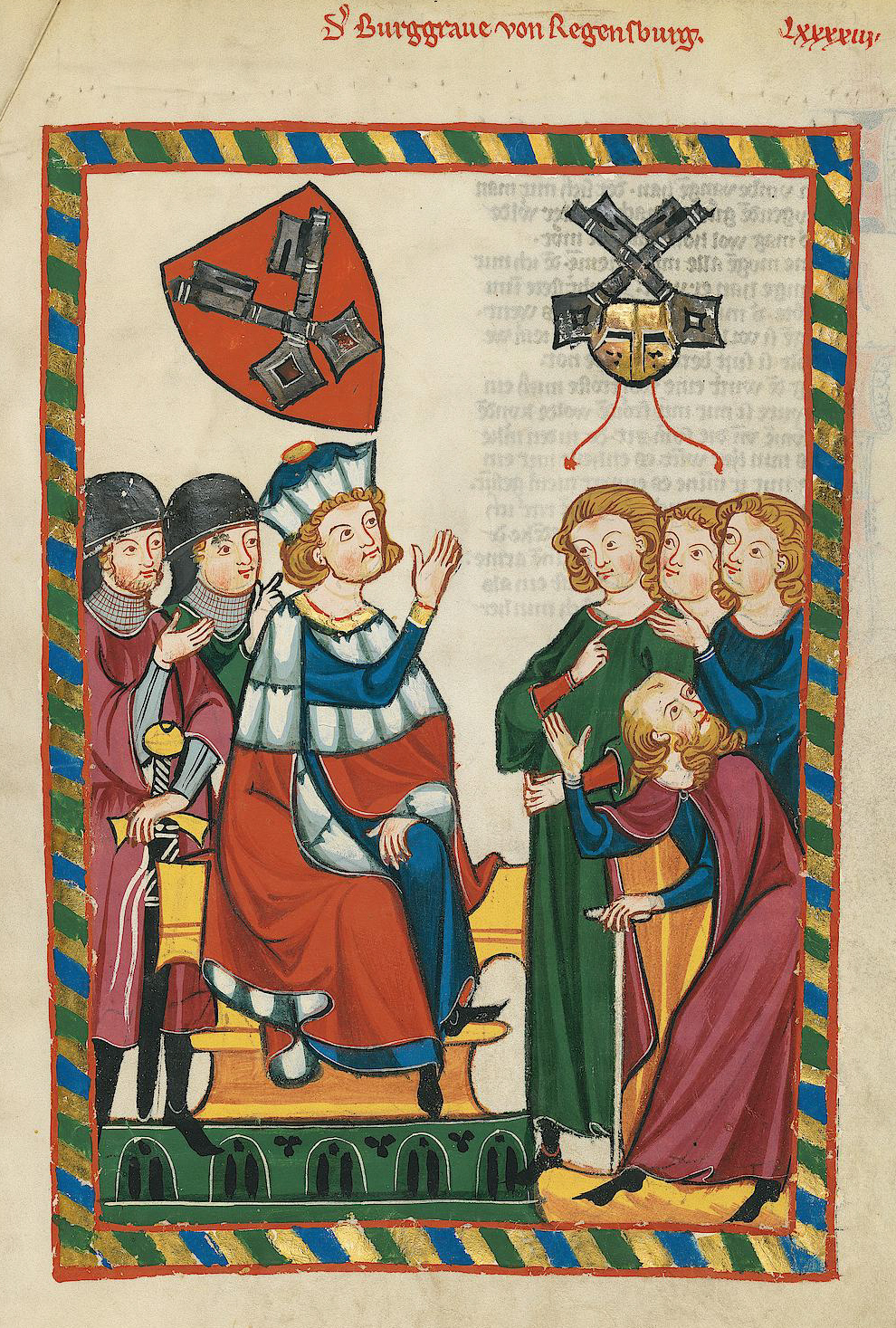 Codex Manesse, UB Heidelberg, Cod. Pal. germ. 848, fol. 318r: Der Burggraf von Regensburg